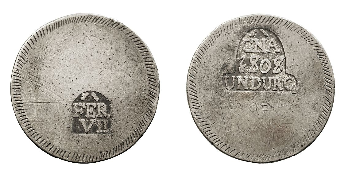 Moneda de ocho rals, amb la denominació Un duro, encunyada en 1808 al regnat de Ferran VII d'Espanya. És una peça de plata fabricada a Girona.